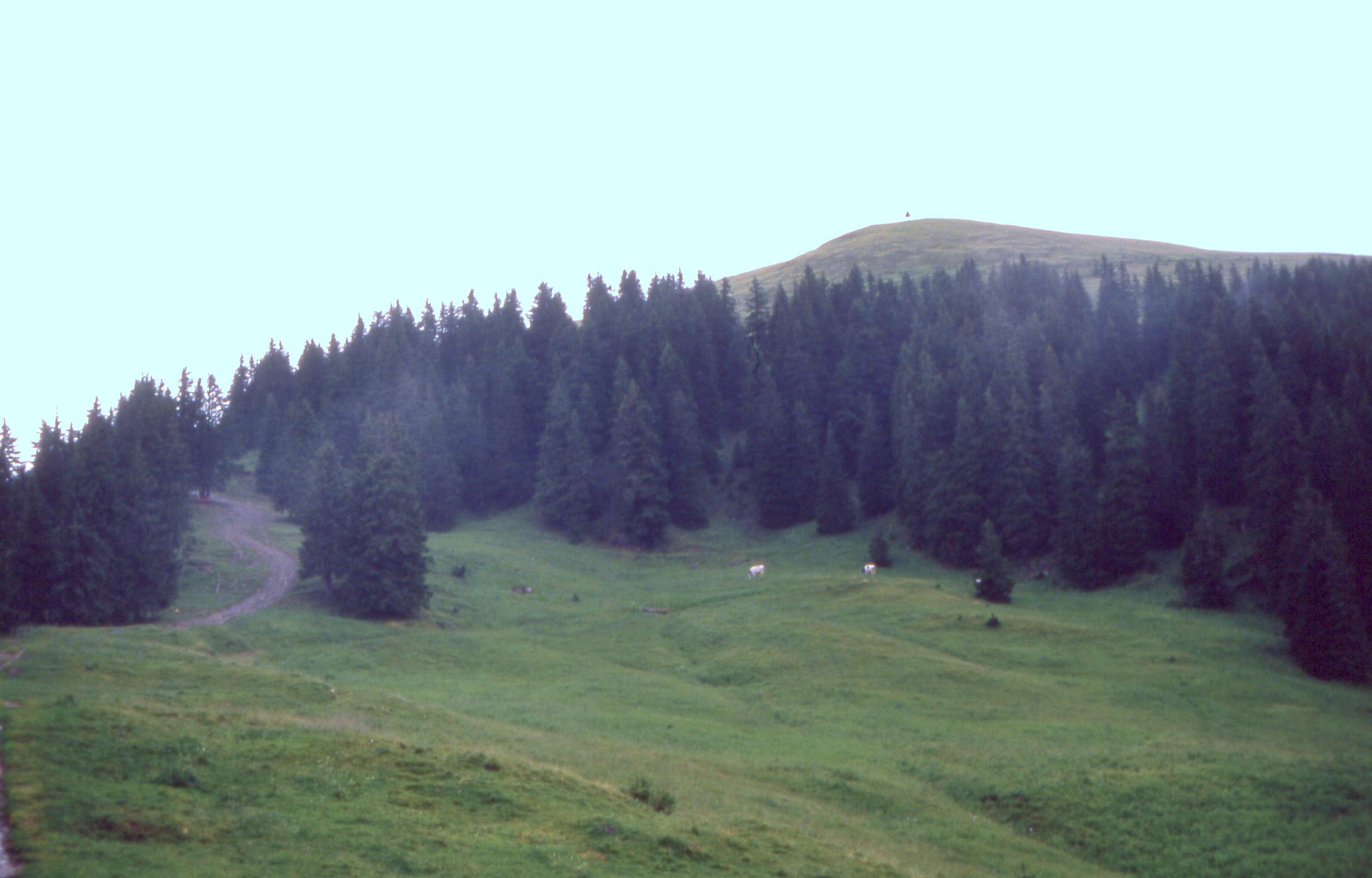 Blick von Westen auf den Gipfel der Berra. Unterhalb des Gipfels befindet sich eine Hochalm; der Berg ist beweidet. An der Spitze ist die Markierung des Trigonometrischen Punktes zu erkennen.